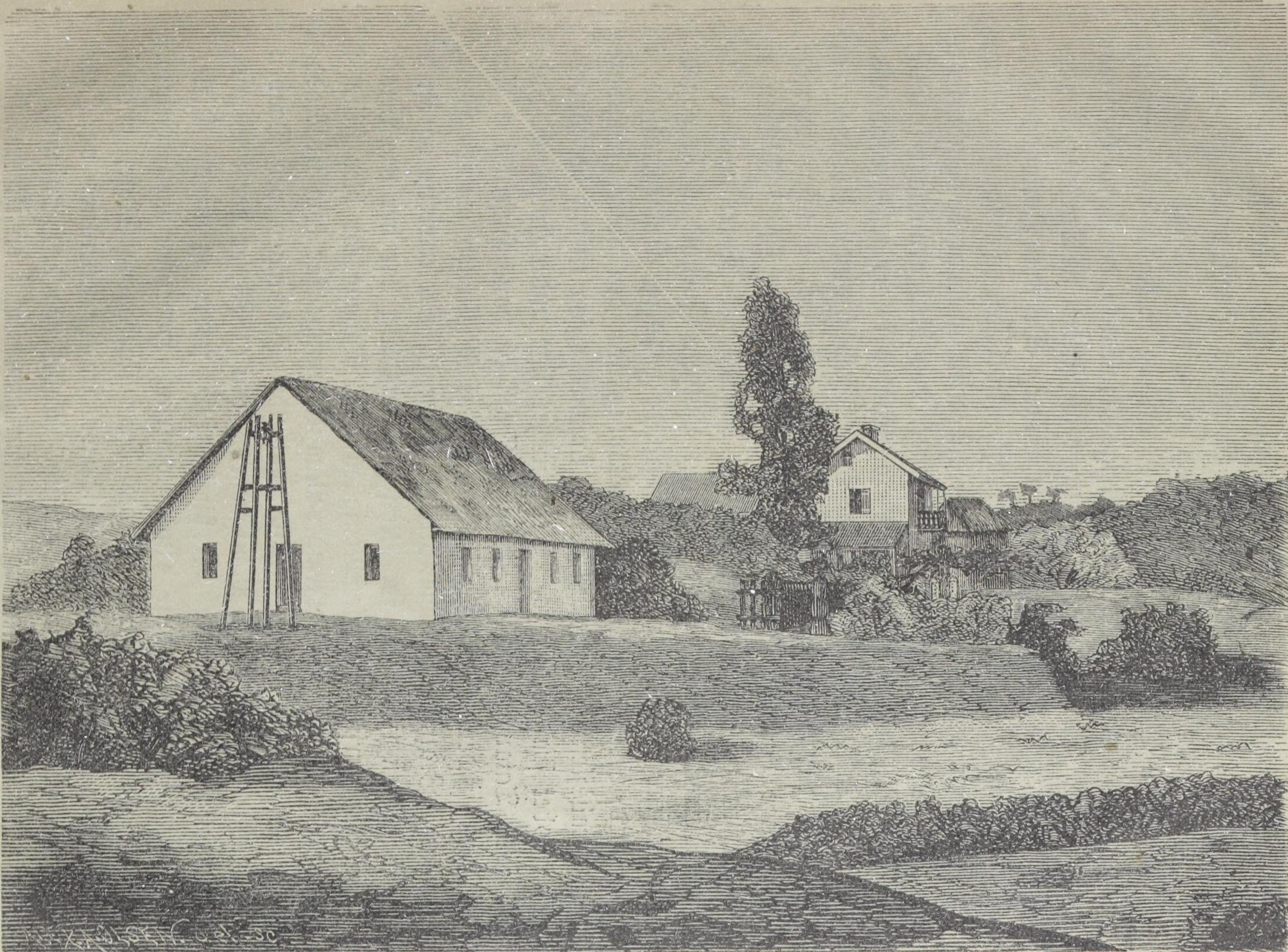 Illustrasjon hentet fra boken "En kortfattet Oversigt over Madagascar, dets Folk og Mission" av Borchgrevink, Chr. og utgitt av Det Norske Missionsselskabs Forlag (Kristiania, 1885)